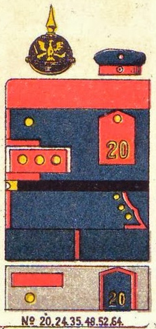 Schematische Farbdarstellung der Uniformen der Brandenburgischen Infanterie-Regimenter Nr. 20, 24, 48, 52, 64 und des Füsilier-Regiments Nr. 35. Vor Einführung der feldgrauen Uniform waren das blauer Uniformrock, rote brandenburger Ärmelaufschläge mit weisser Paspel, rote Schulterstücke mit gelben Ziffern und gelber Linien-Adler auf der Pickelhaube.